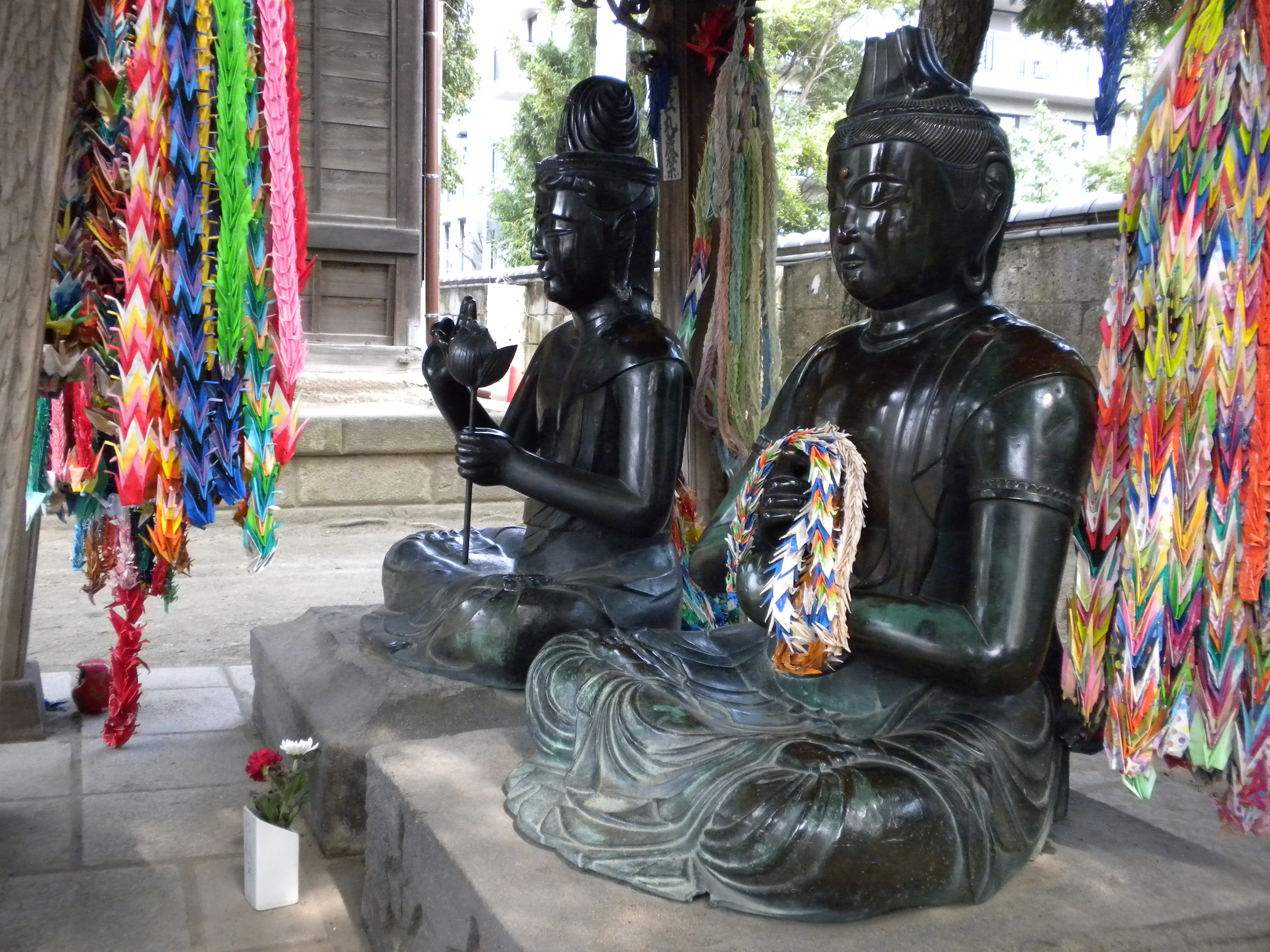 経栄山題経寺（柴又帝釈天）にある十一面観音像